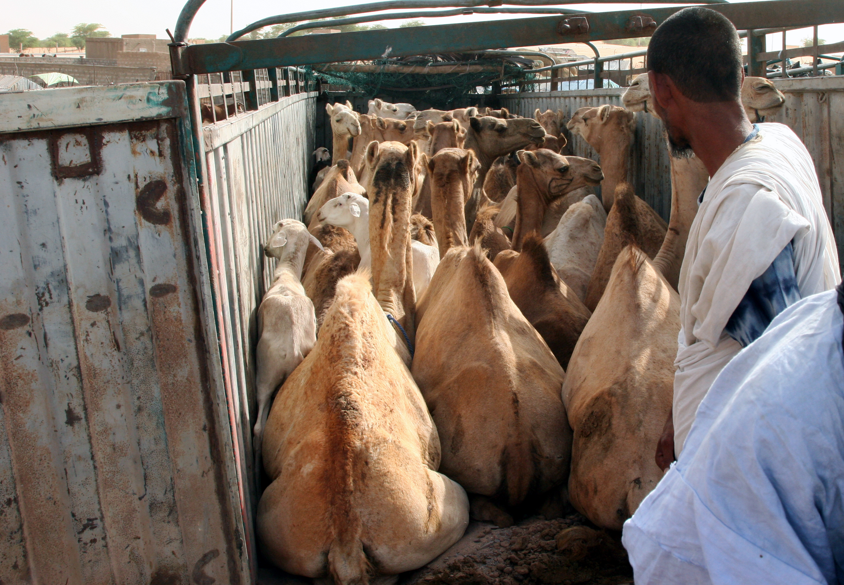 Mauritania, September 2008